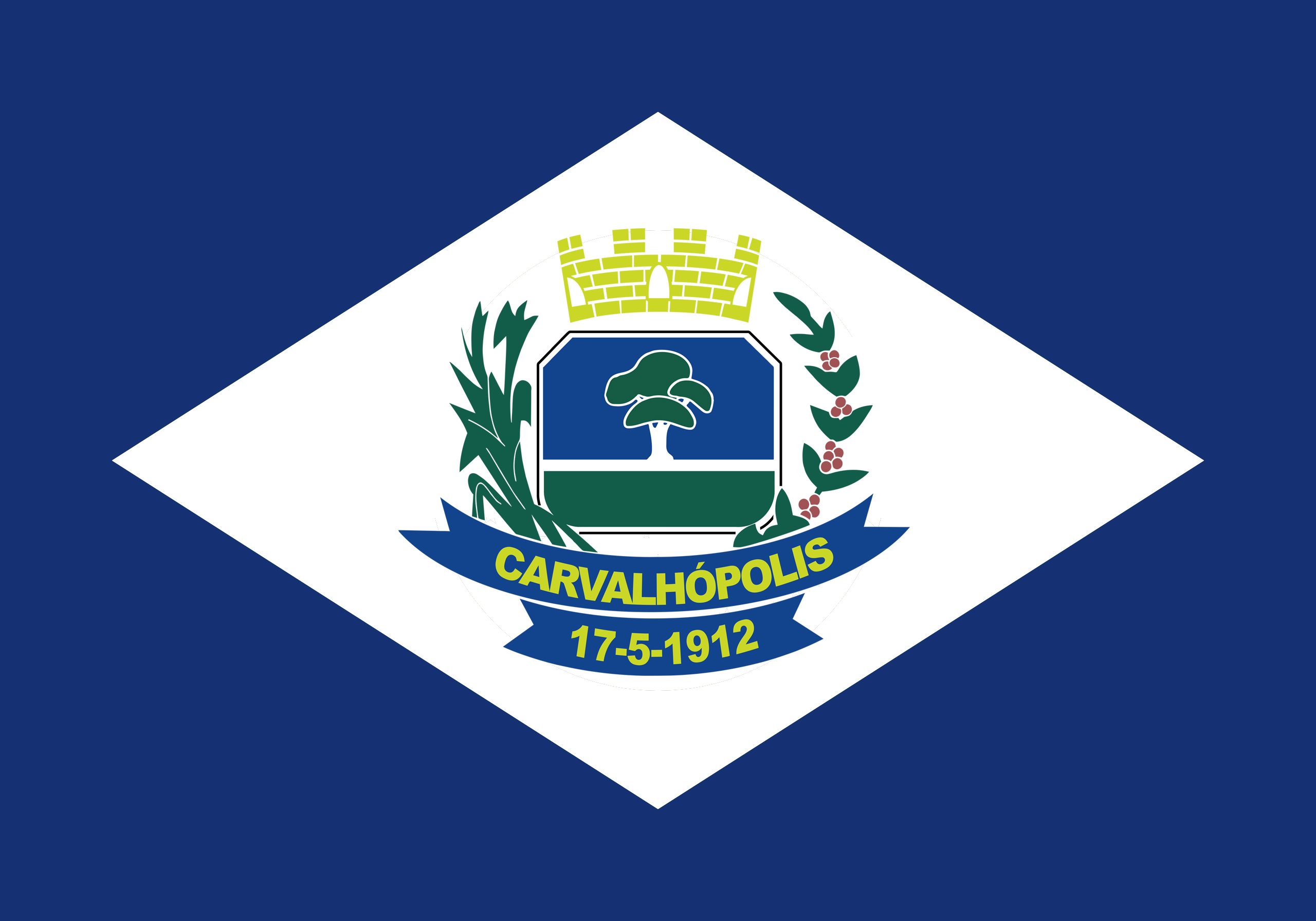 Bandeira do município de Carvalhópolis